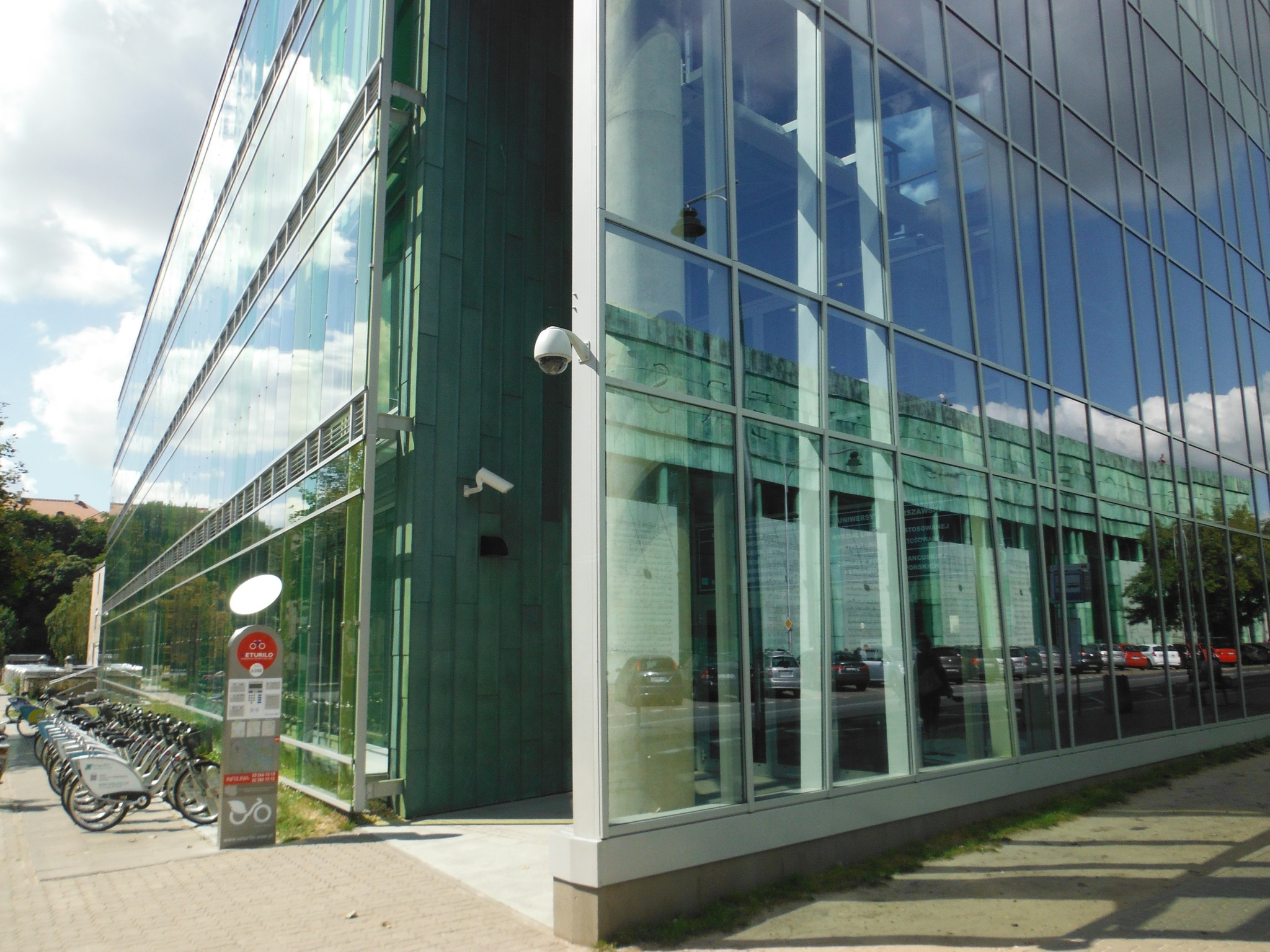 Gmach Wydziału Lingwistyki Stosowanej UW przy ul. Dobrej w Warszawie.